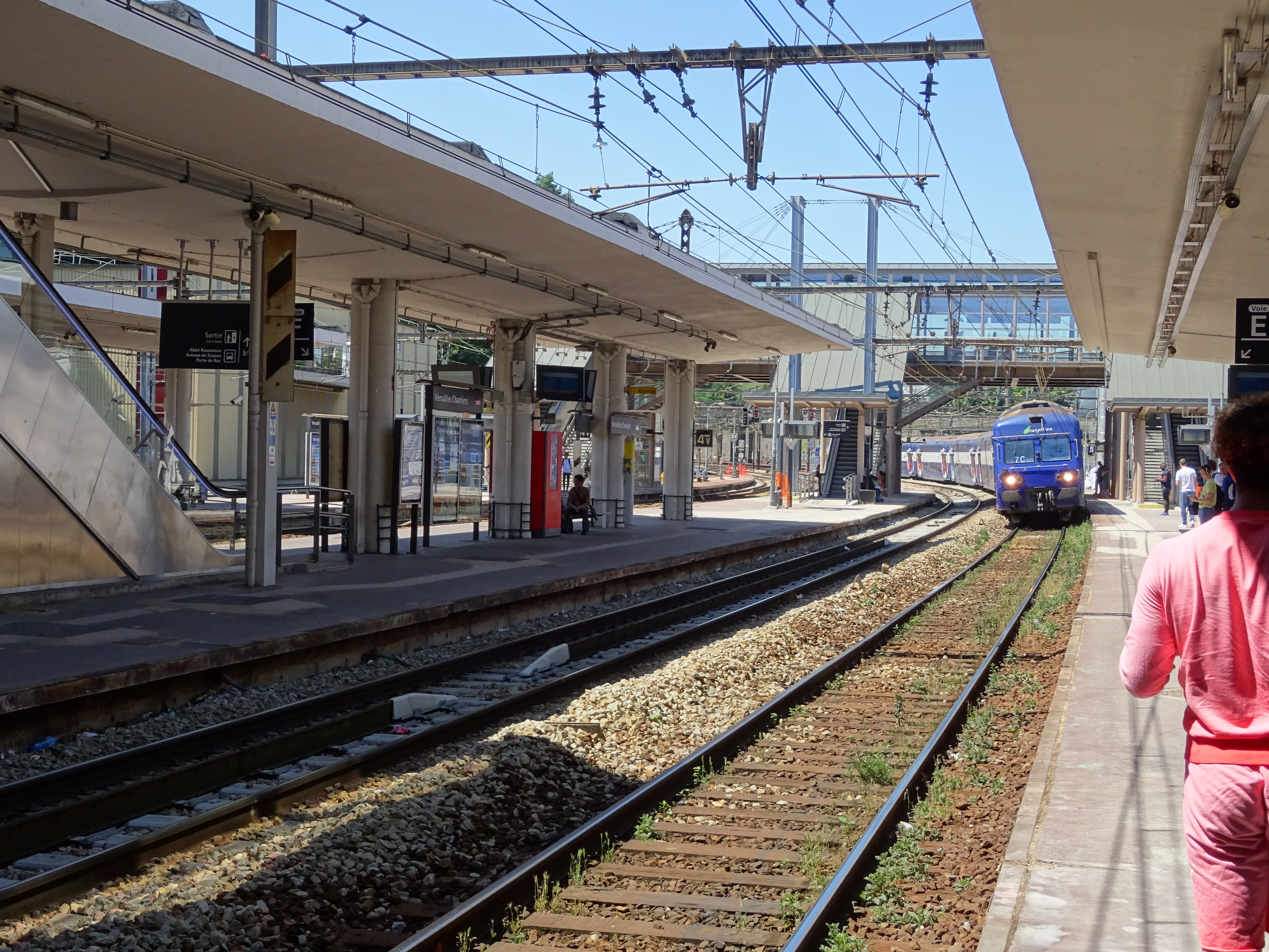 VB2N arrivant à Versailles-Chantiers